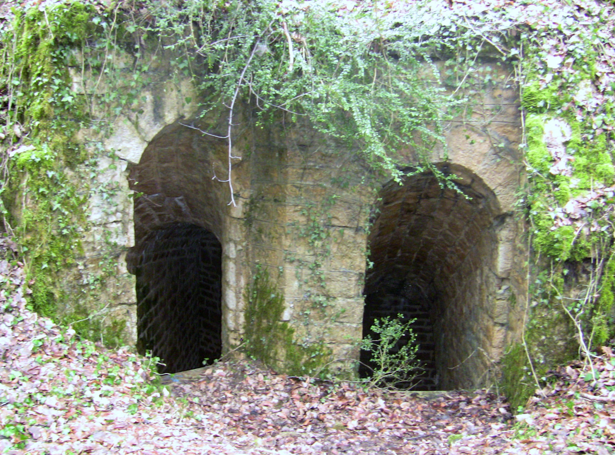 Un abris de la batterie extrême sud-ouest du fort de Planoise, à Besançon (Doubs, France).